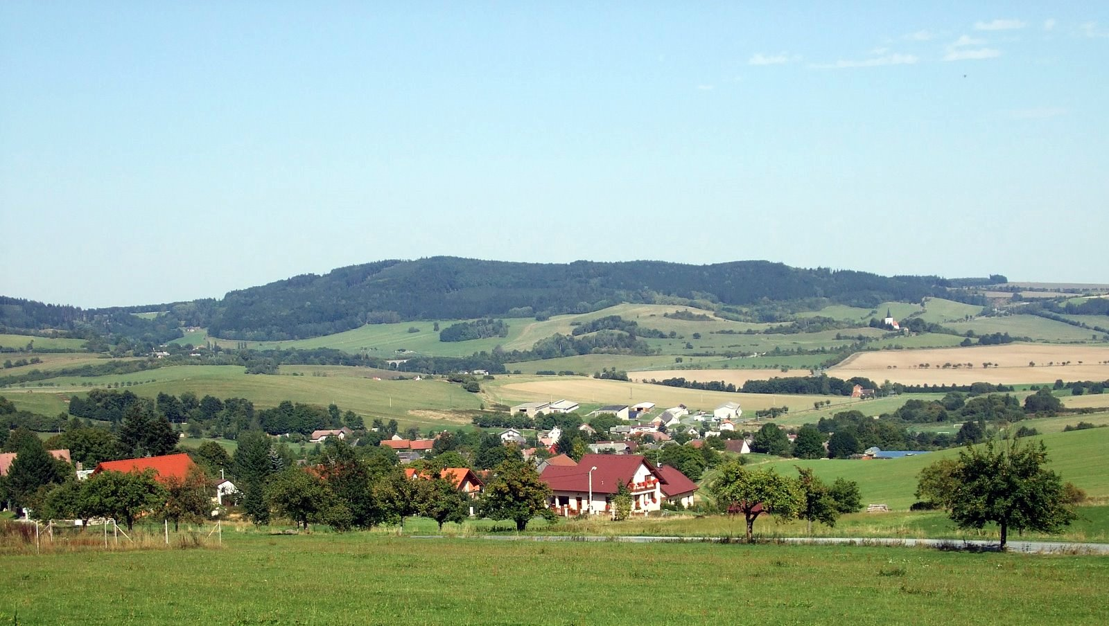 pohled na Chodskou Lhotu od Lomečku